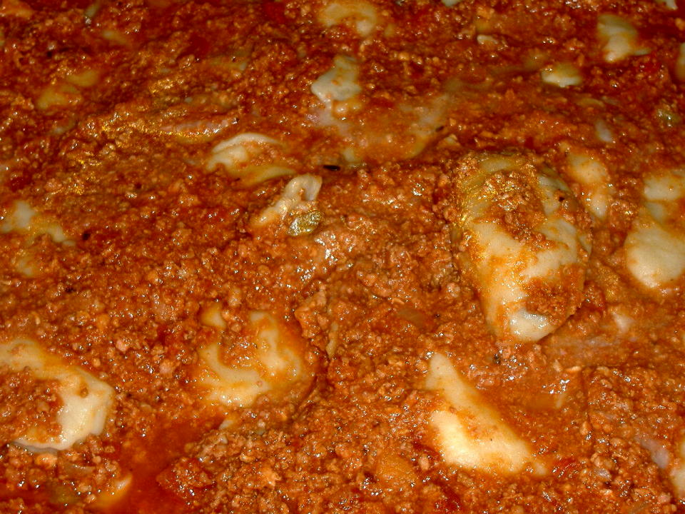 Tordelli (ravioli) al ragù